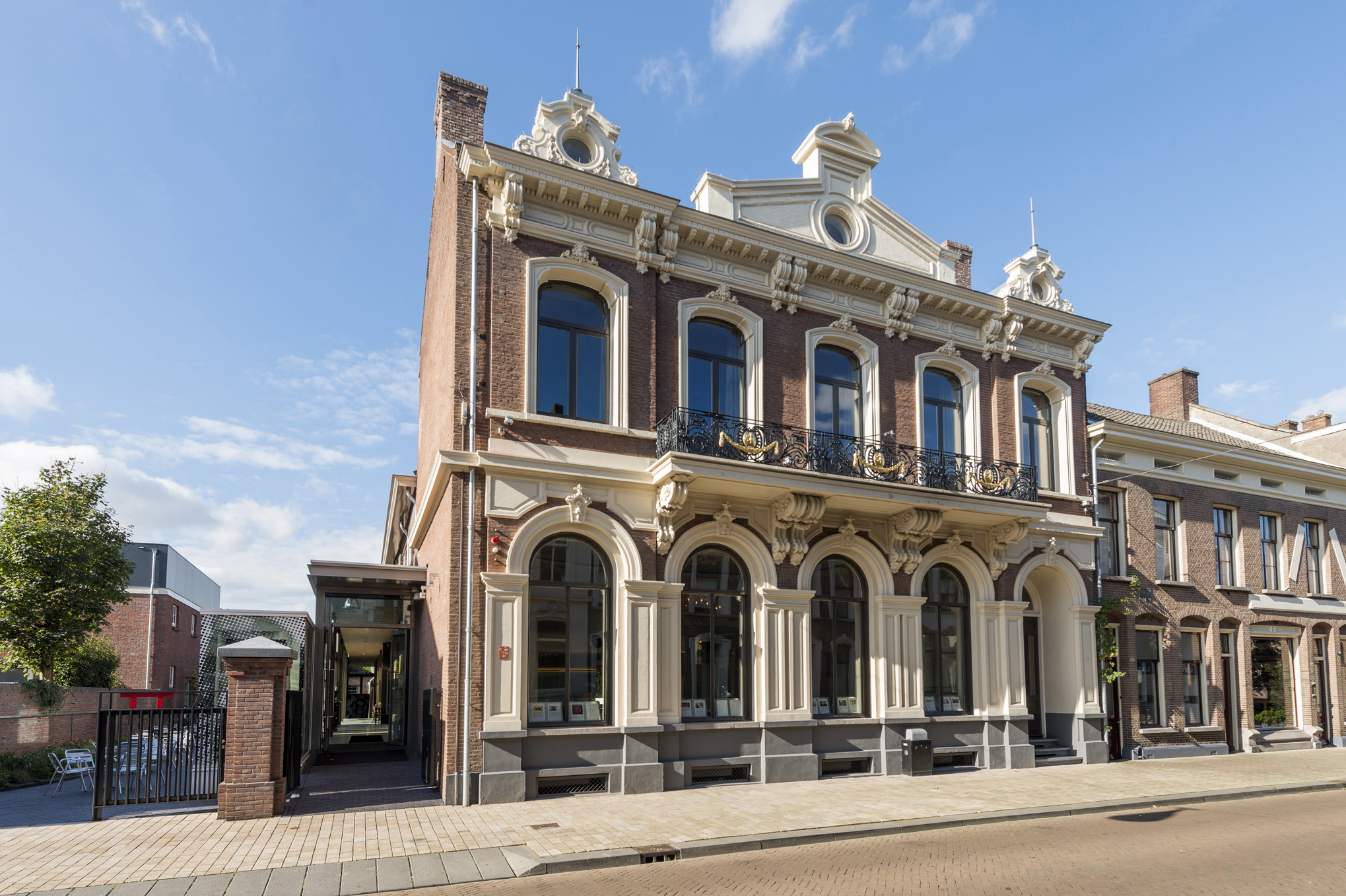 De buitenkant van bioscoop Cinecitta, aan de Willem II-straat in Tilburg. Aan de linker kant ziet u de nieuwe Gaanderij